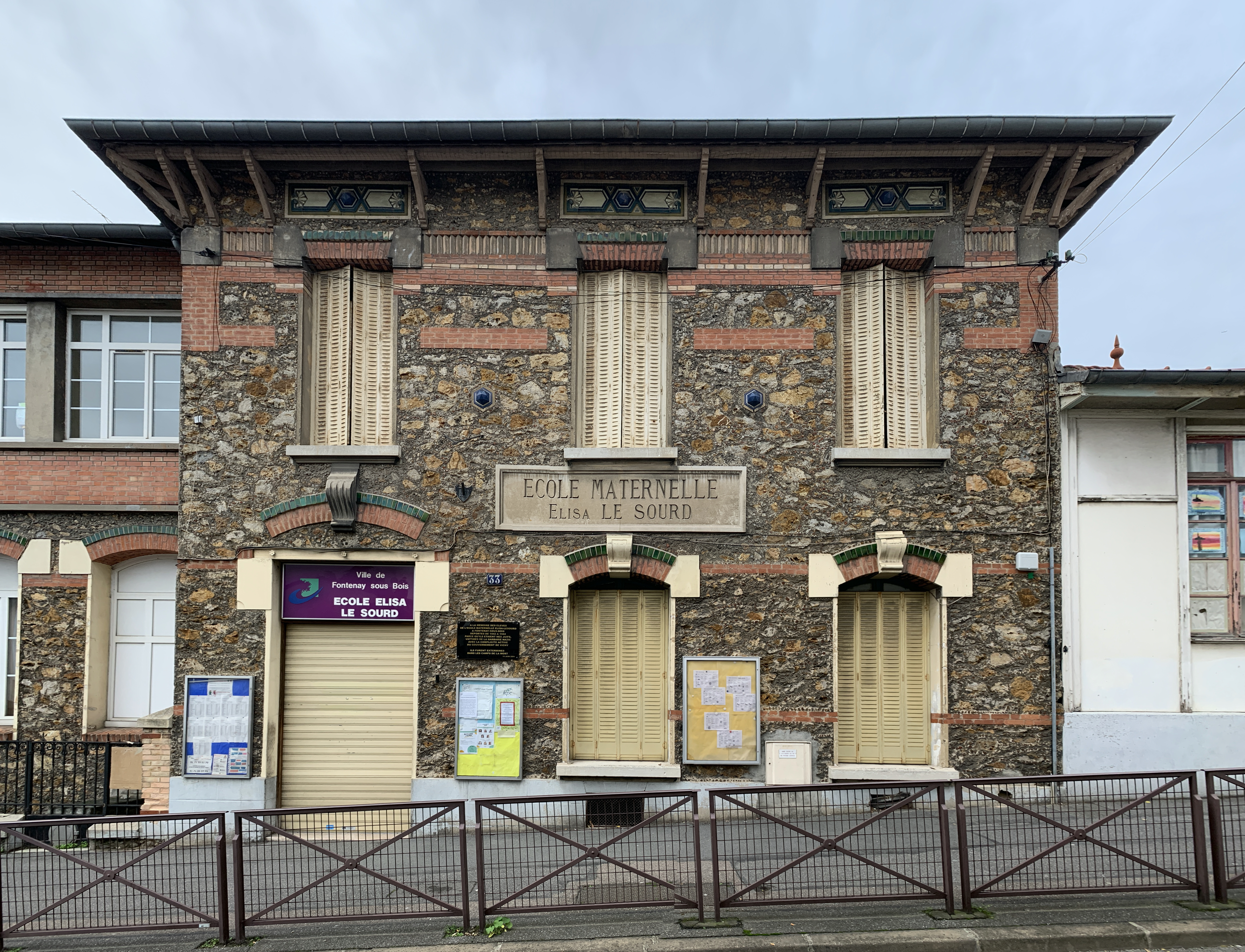 École Élisa Le Sourd, Fontenay-sous-Bois.